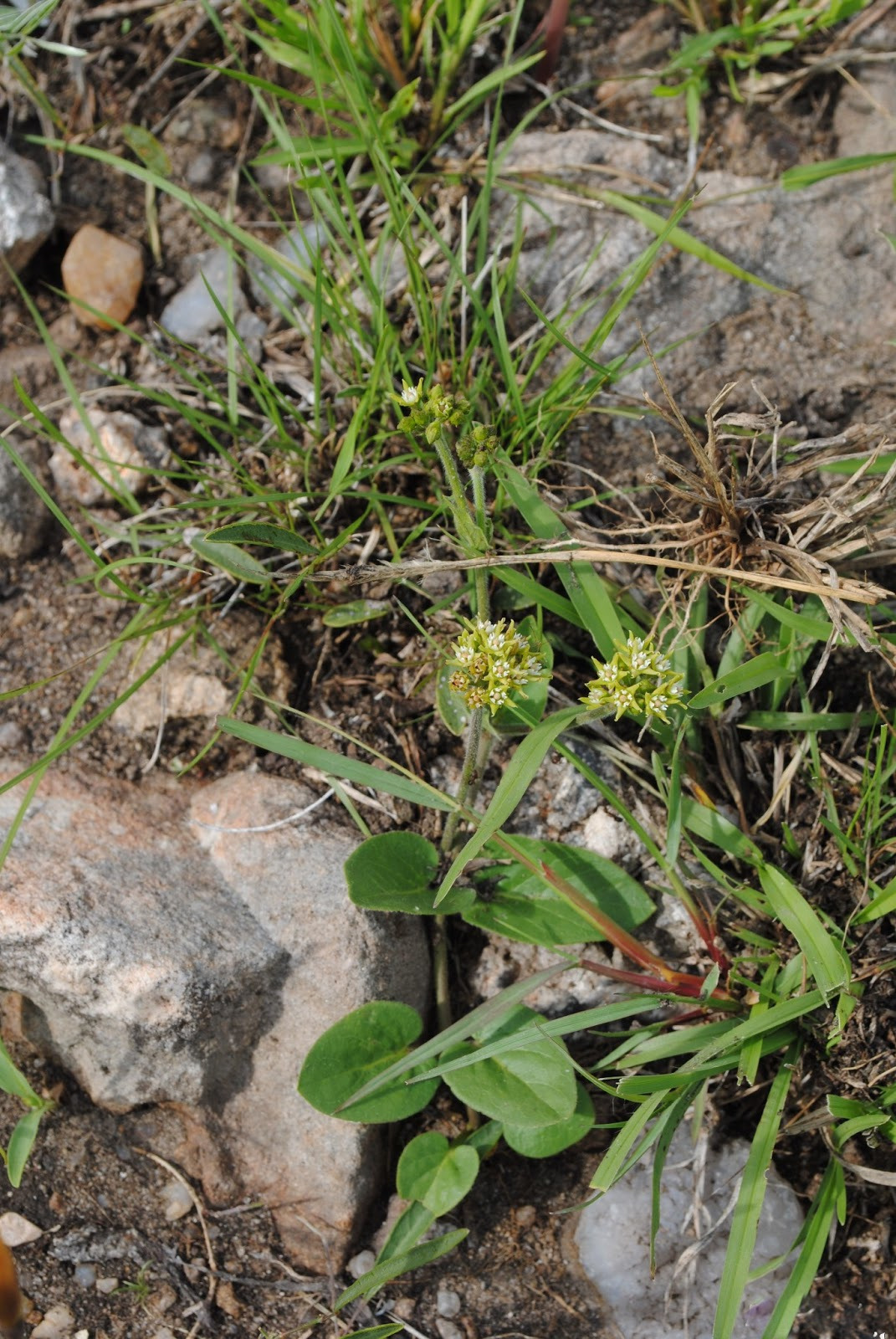 Oxypetalum commersonianum. Apocynaceae. Fotos tomadas sobre suelo arenoso pedregoso húmedo al margen del Lago de Palmar, departamento de Soriano, Uruguay.